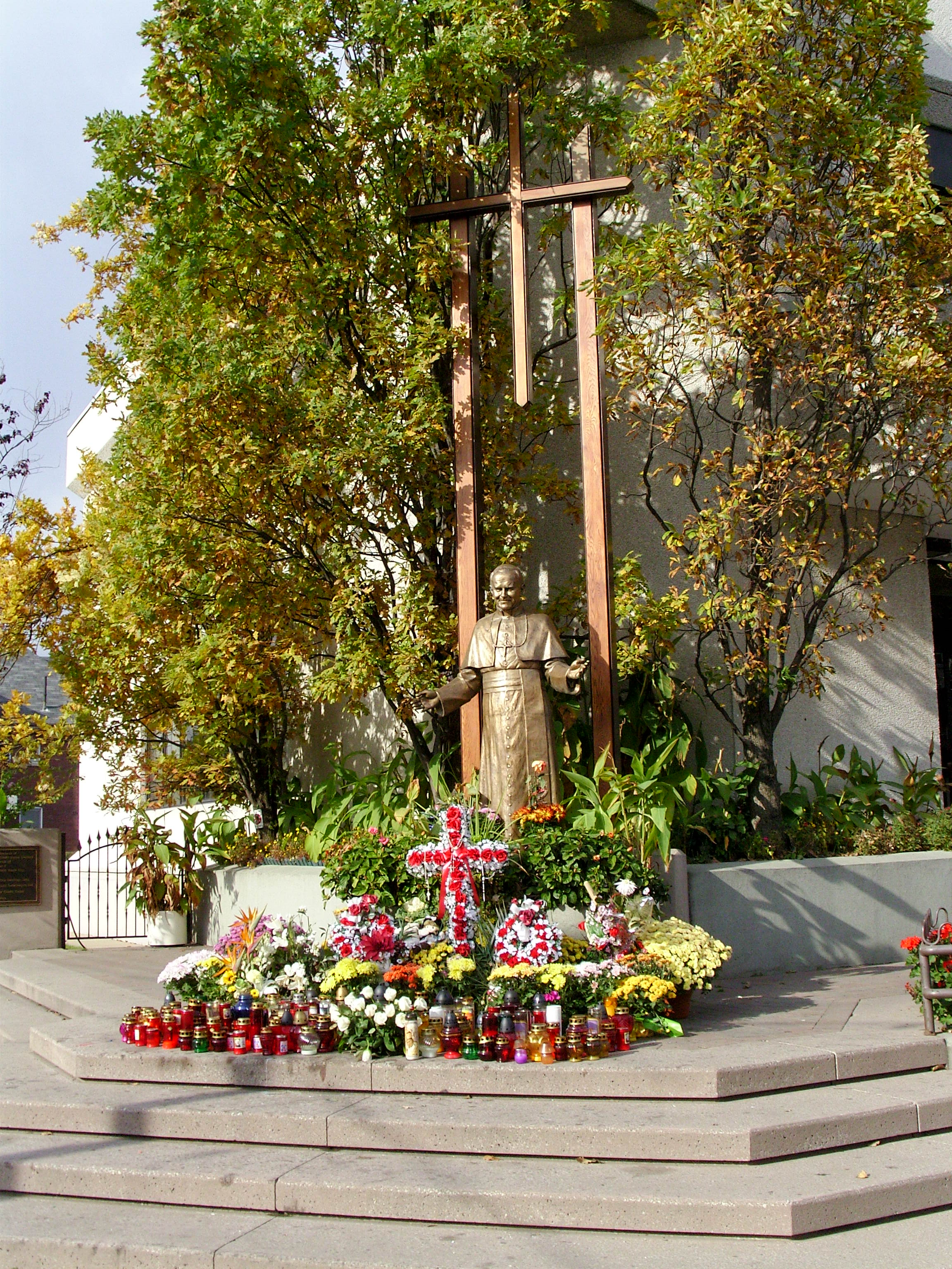 Pope John Paul II statue, Roncesvalles Avenue, Toronto, Ontario, Canada